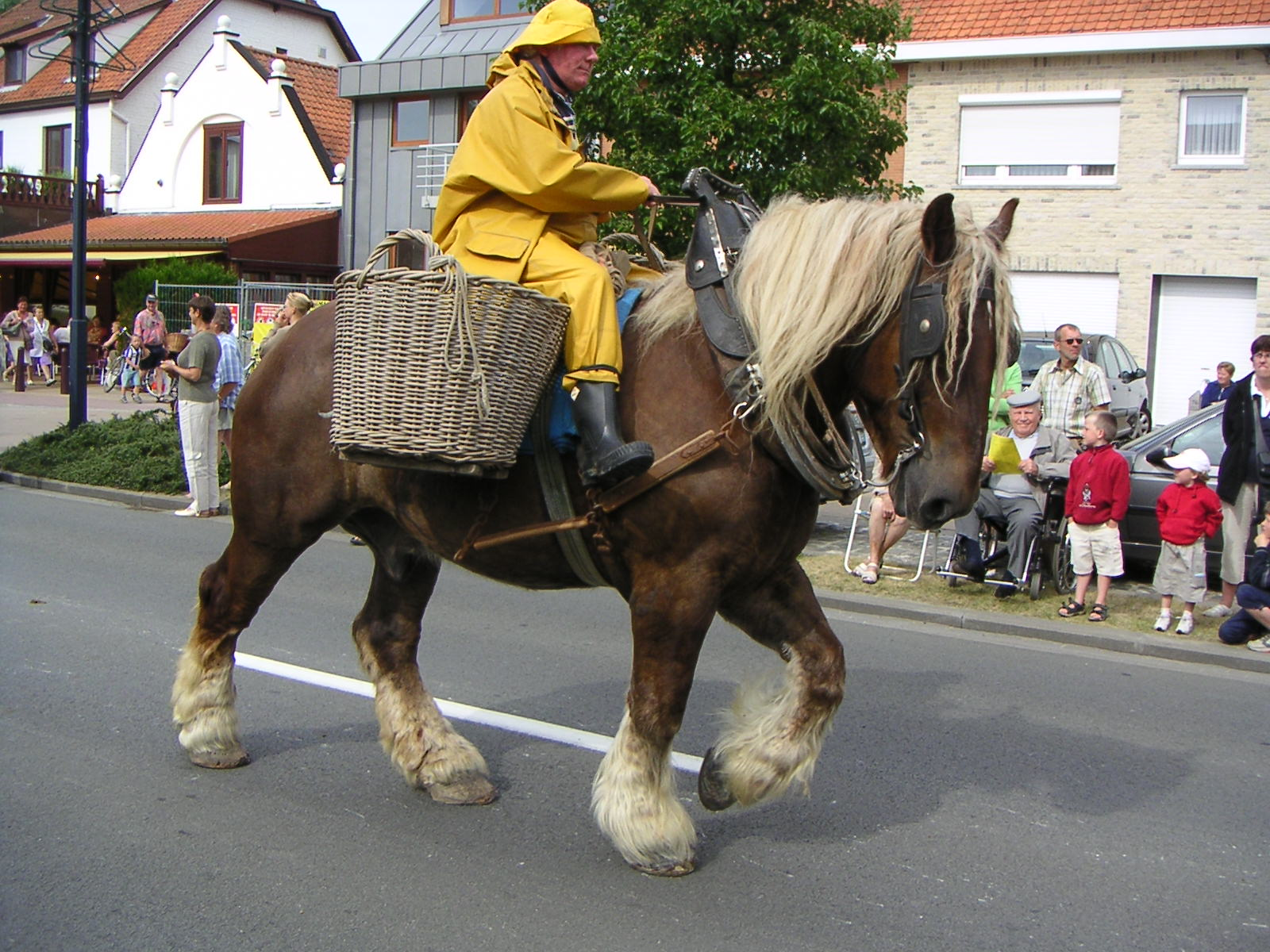 Garnaalvisser in garnaalstoet - ODK